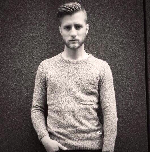 Jan Lodewijk Versteegh (Rotterdam, 31 december 1985) is een Nederlands televisiemaker en verslaggever.